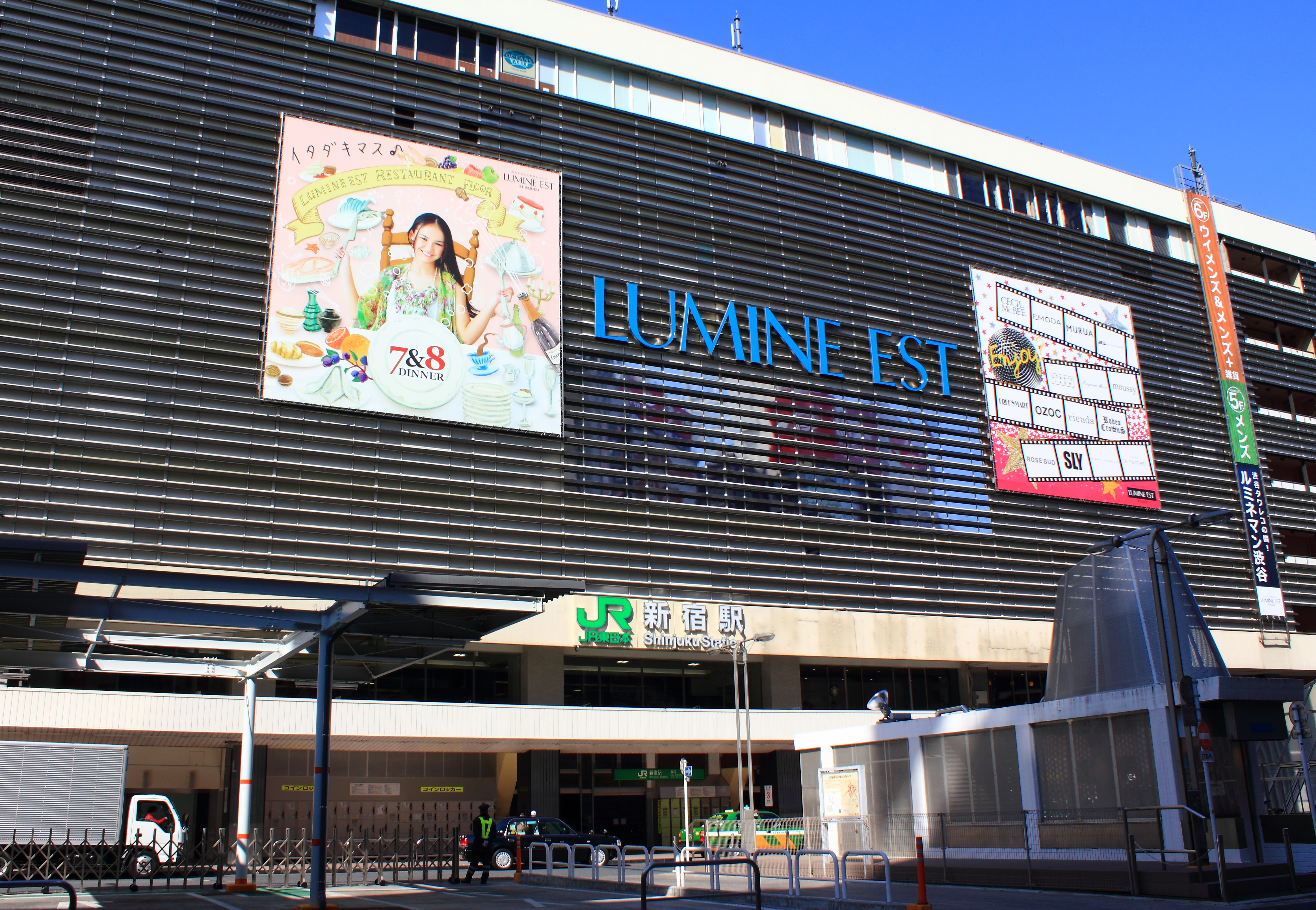 新宿駅東口, LUMINE EST